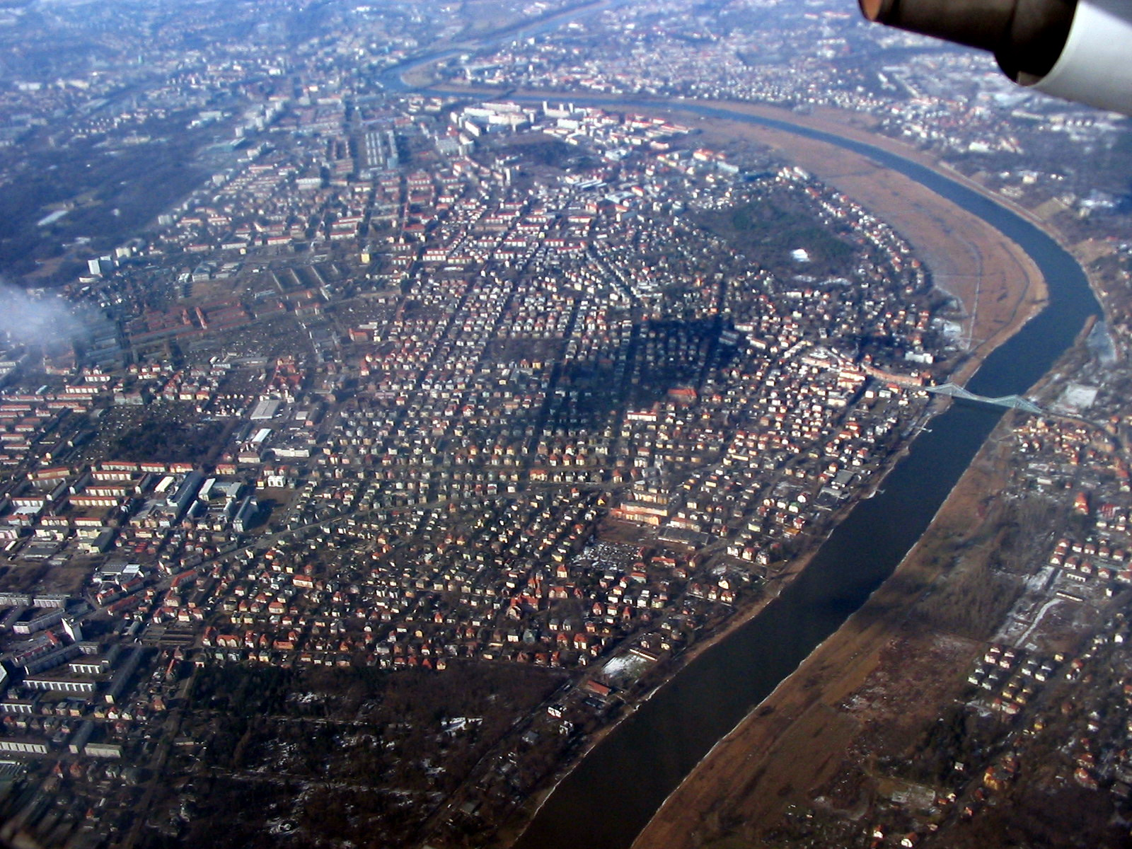 Blick auf Dresden-Striesen, Blasewitz und das Blaue Wunder aus dem Fenster eines Flugzeugs.